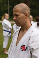 Herik Tölpt Aravete 2007